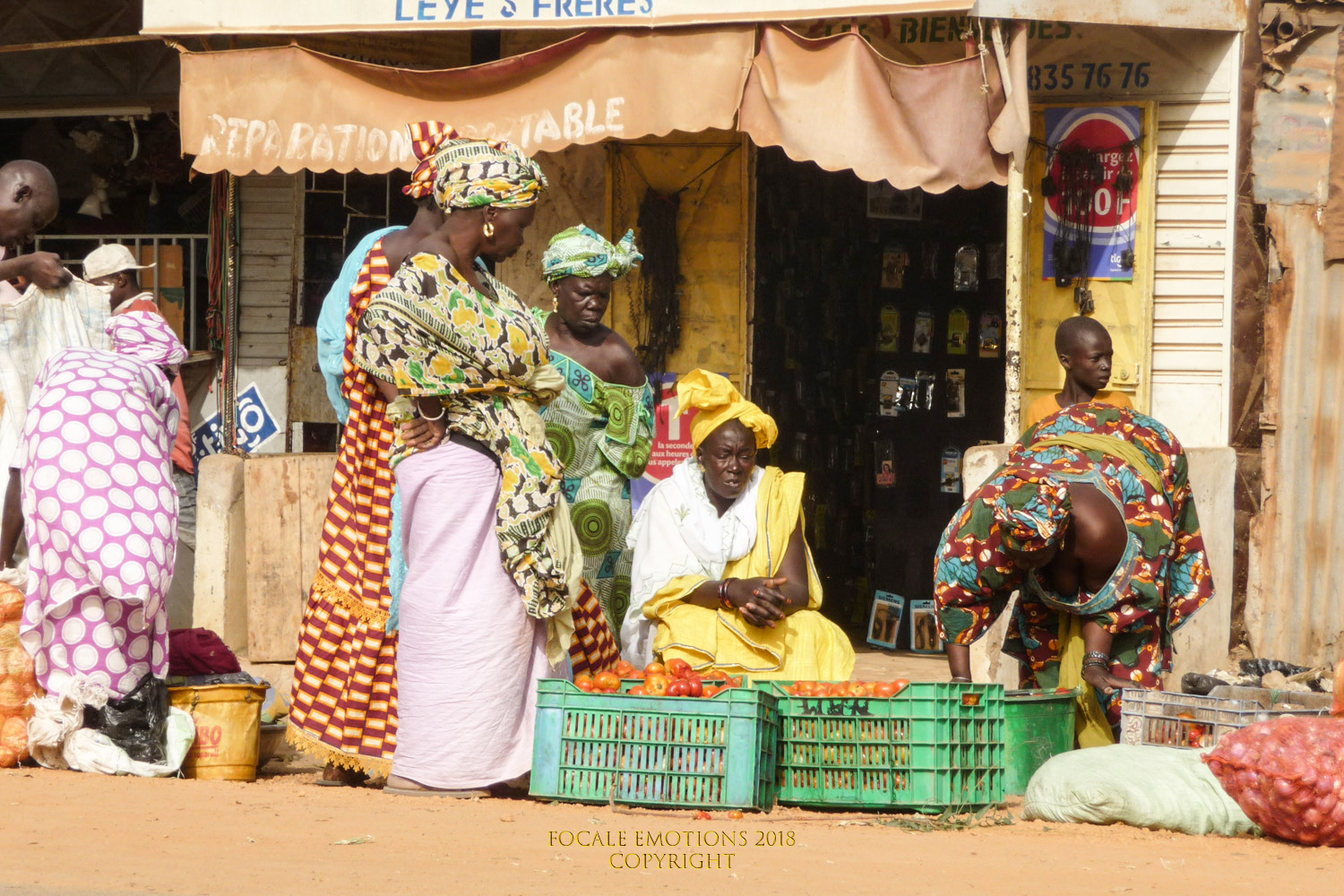 En bordure de route le marché de Mbour, sur la route de Mbour-Joal This is an image with the theme "Africa on the Move or Transport" from: Senegal